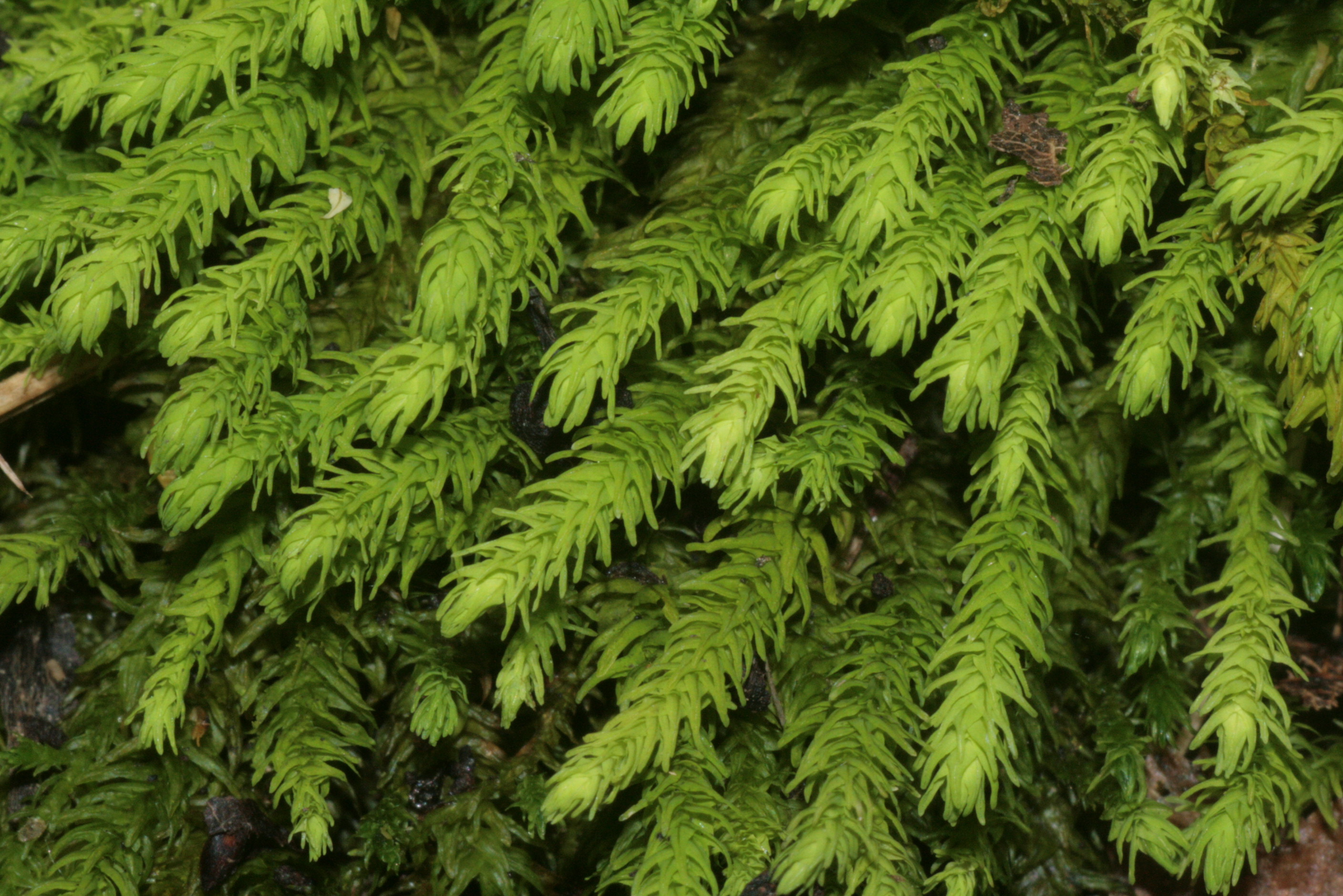 Anomodon viticulosus. Aufnahmeort: Förthofgraben, Wachau, Niederösterreich, Austria